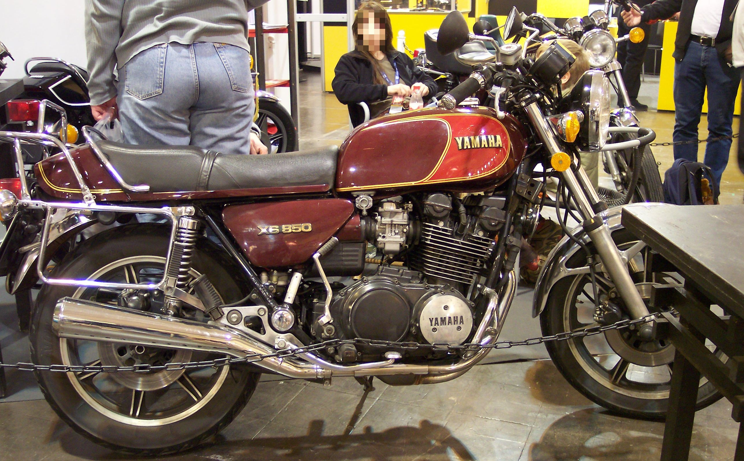 Yamaha XS 850